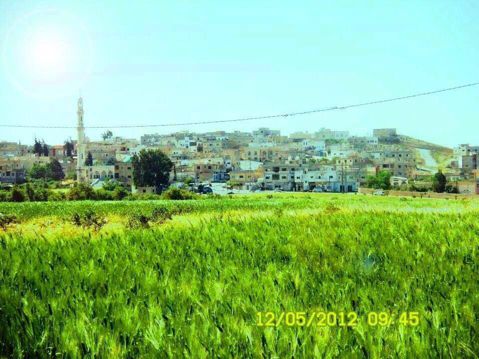 منظر عام لقرية سال